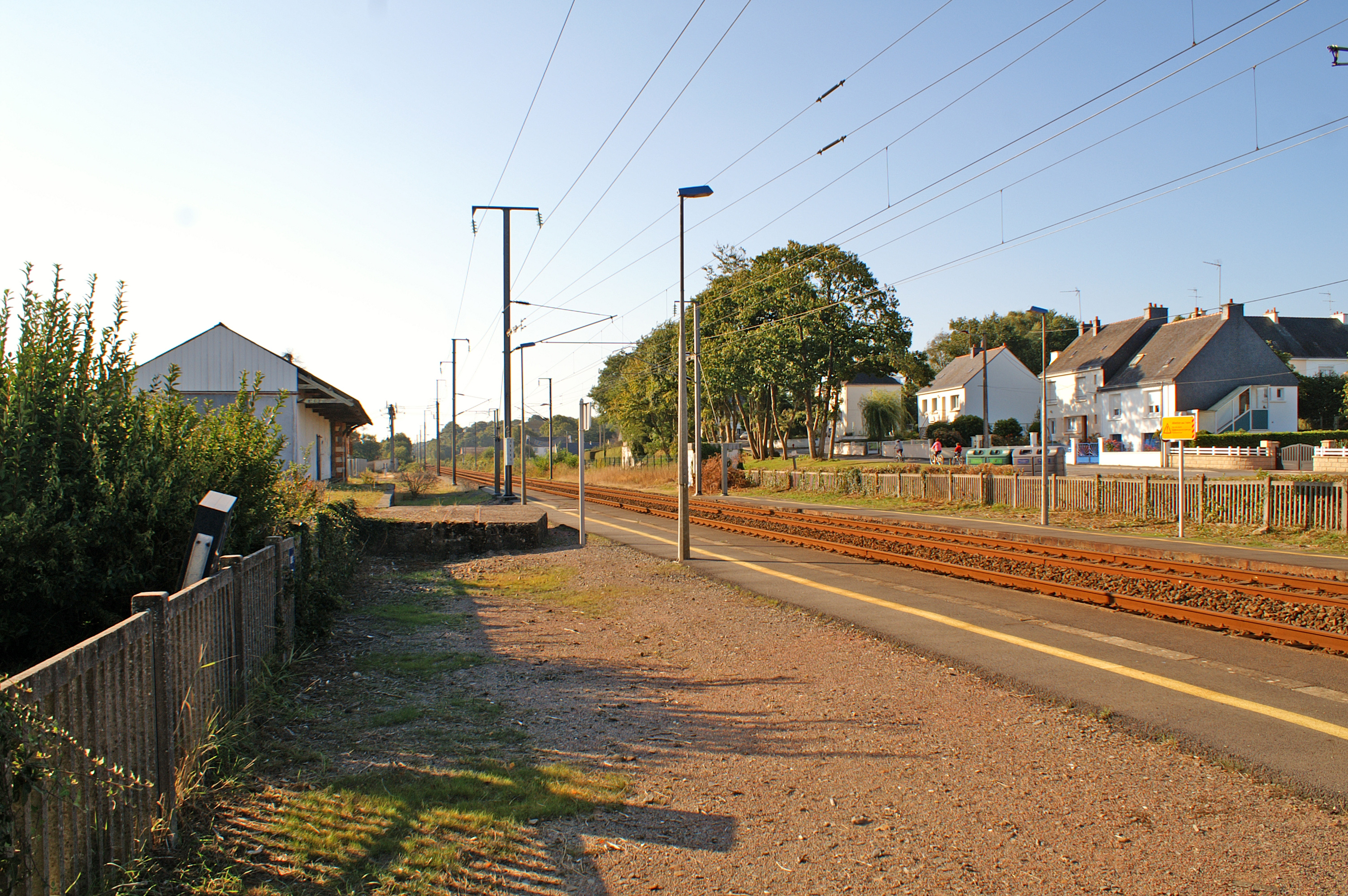 Gare de Gestel, la halte SNCF en direction de Lorient. L'ancienne halle à marchandises est visible sur la gauche.